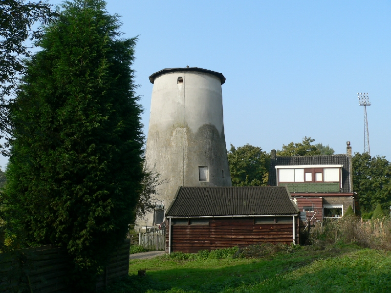 De Babbersmolen in volle glorie in zijn huidige toestand